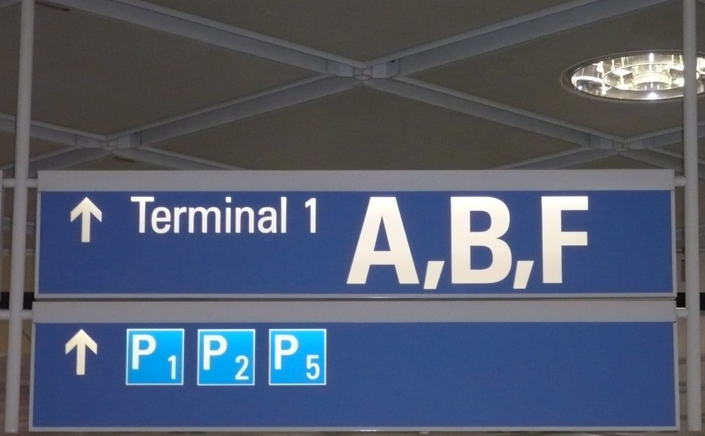 Fluginformationstafeln (Terminal 1) des Flughafen Münchens